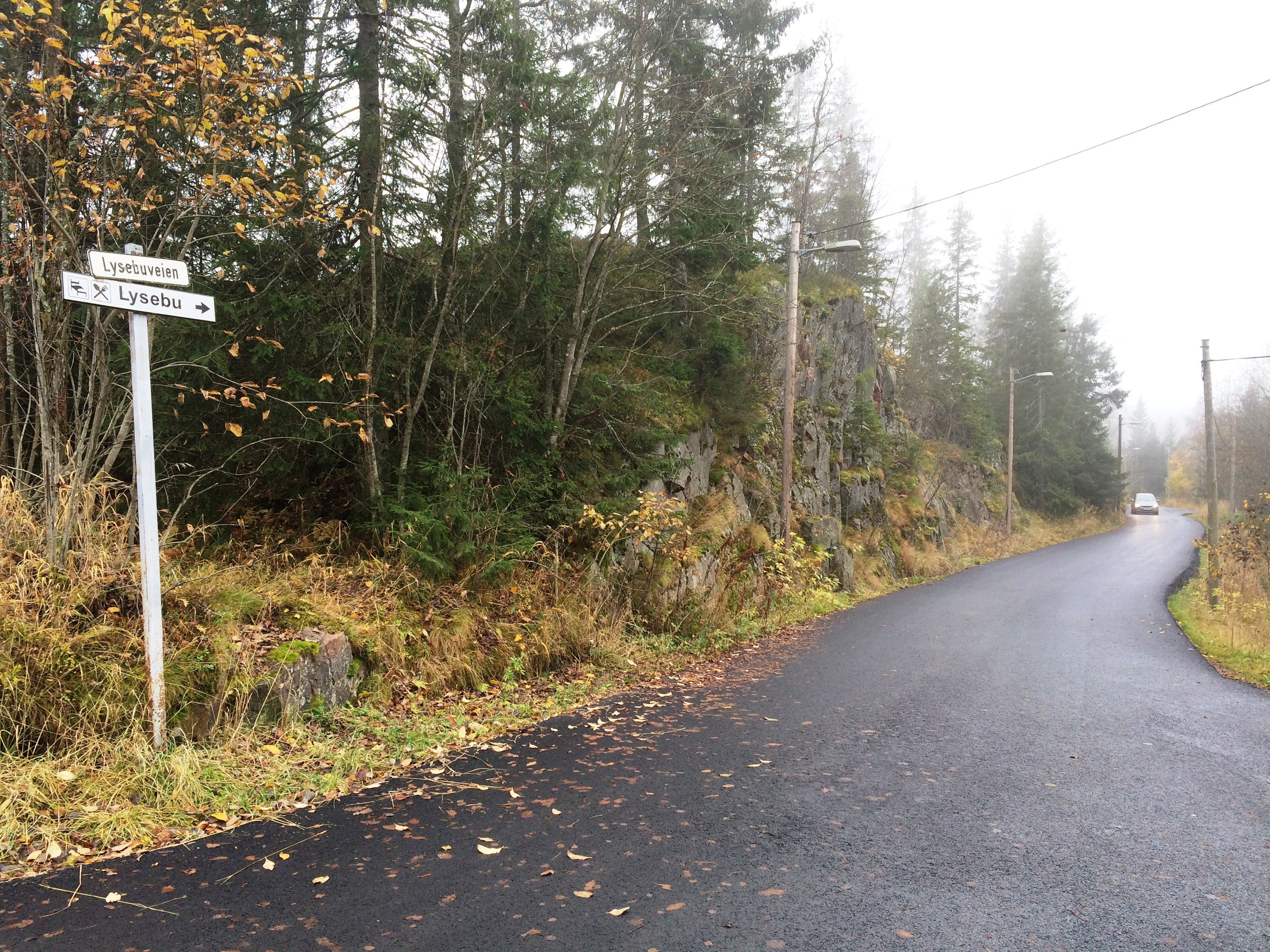 Lysebuveien sett fra Voksenkollveien